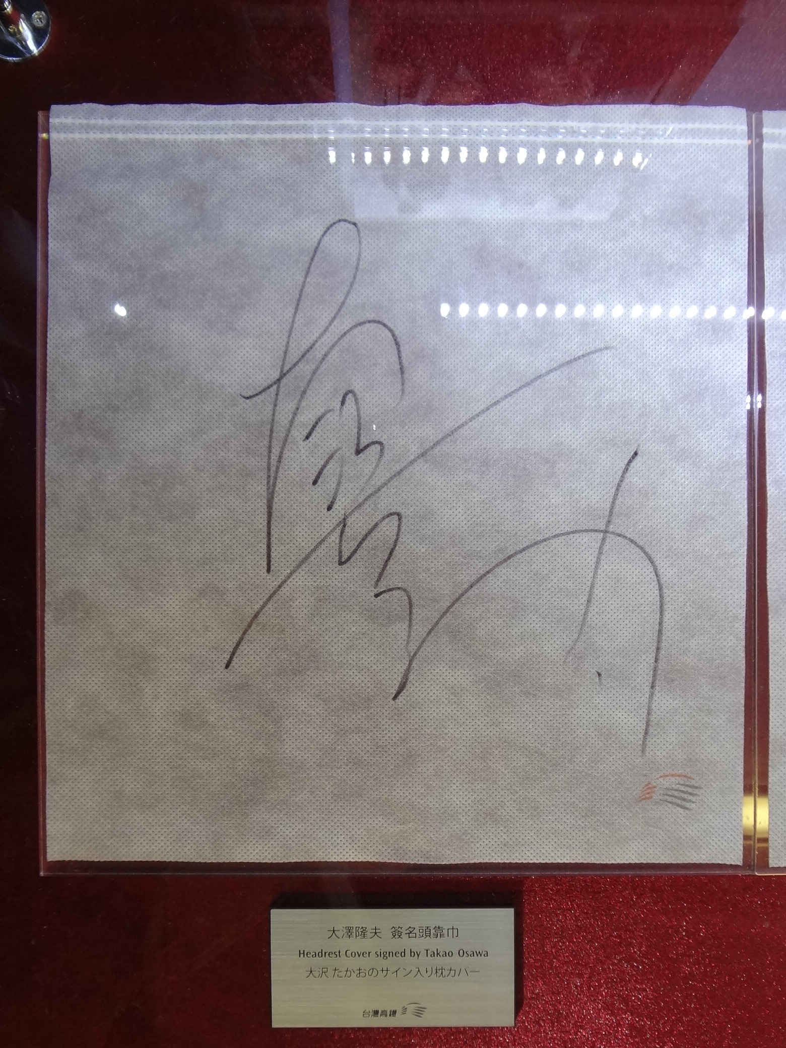 台北車站地下一樓展示電影《十億追殺令》演員大澤隆夫簽名台灣高鐵頭靠巾。